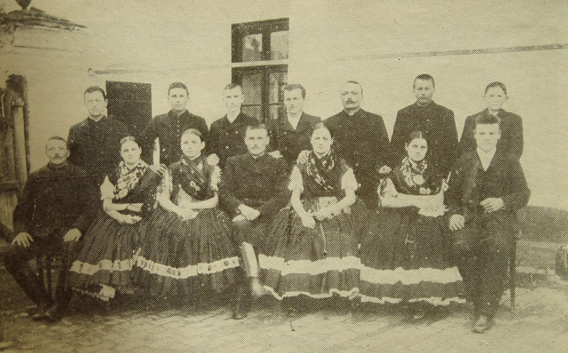 Prvá slovenská divadelná hra na Komlóši "Kubo"